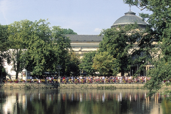 Veranstaltung des Rheingau Musik Festivals an der Konzertmuschel des Kurparks Wiesbaden